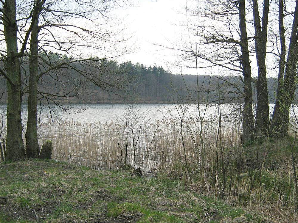 Jezioro Kamienica.